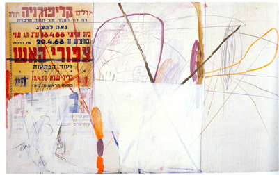 Painting